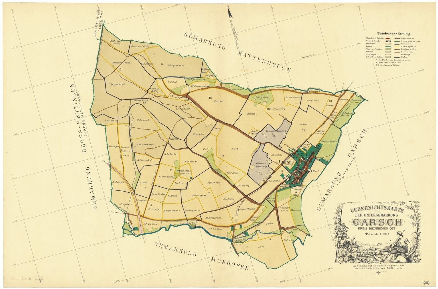 Plans cadastraux -- France -- Garche (Moselle).